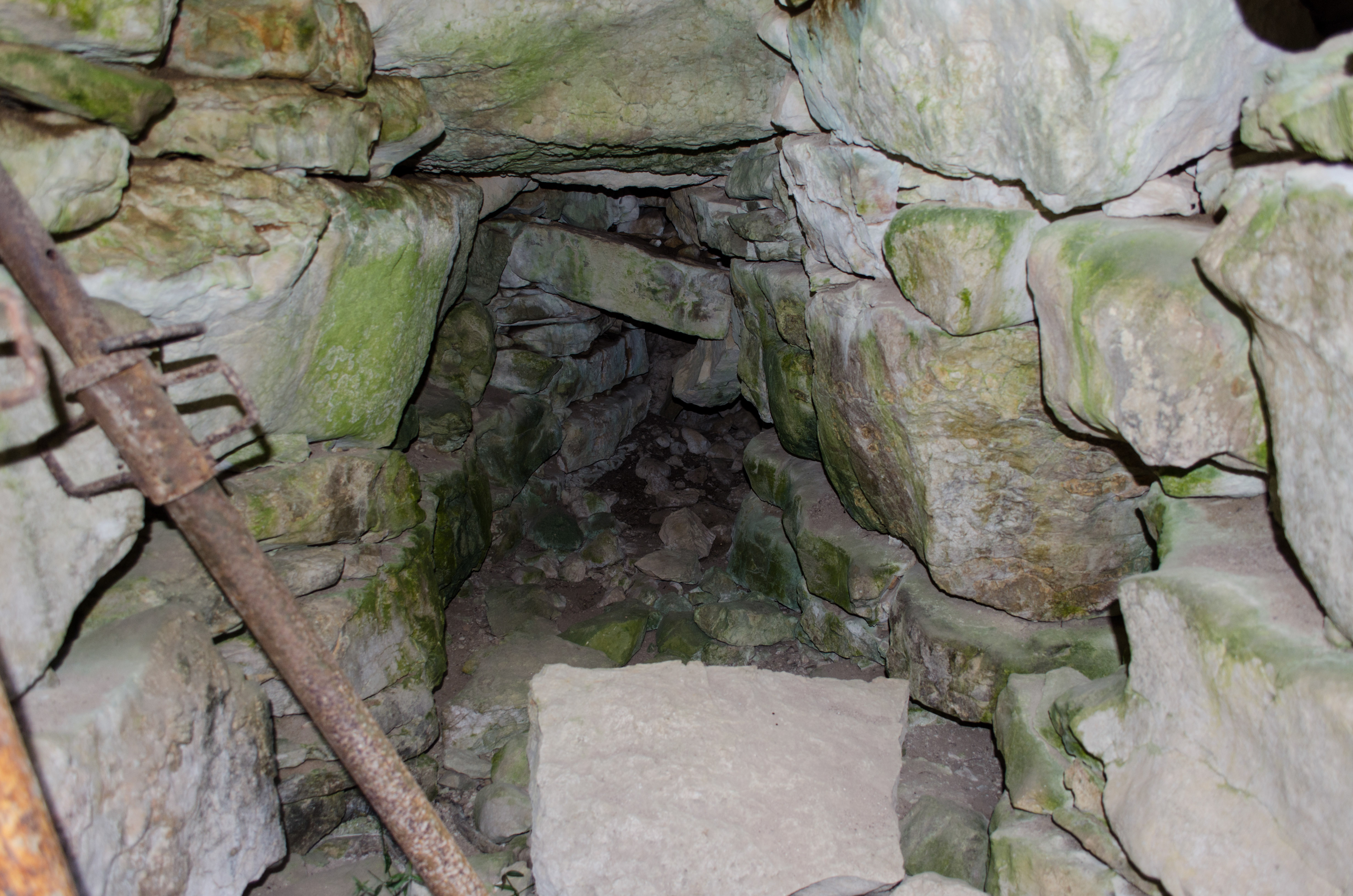 Es claper des Gegant